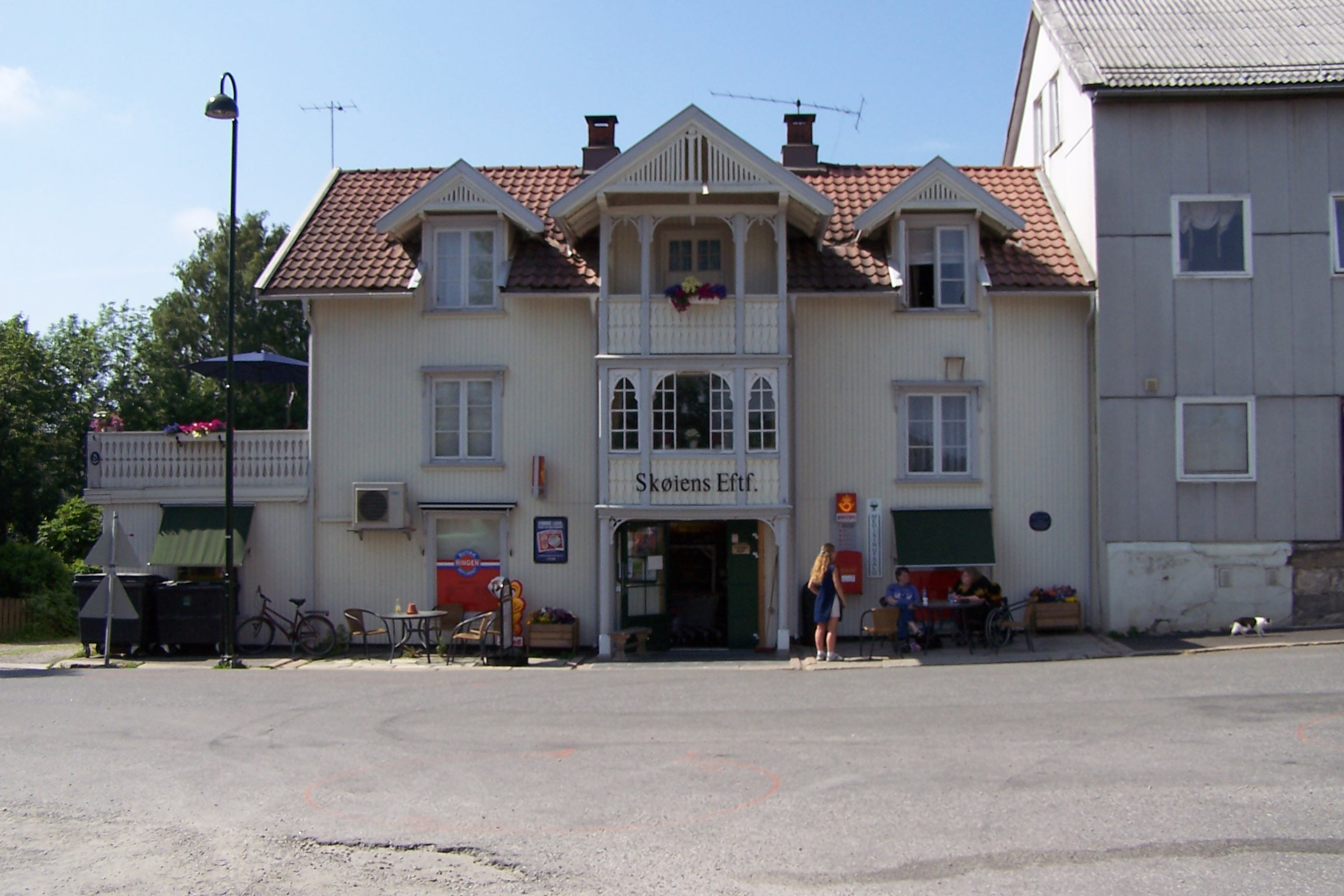 Hølen, "Røttergården", built c. 1847